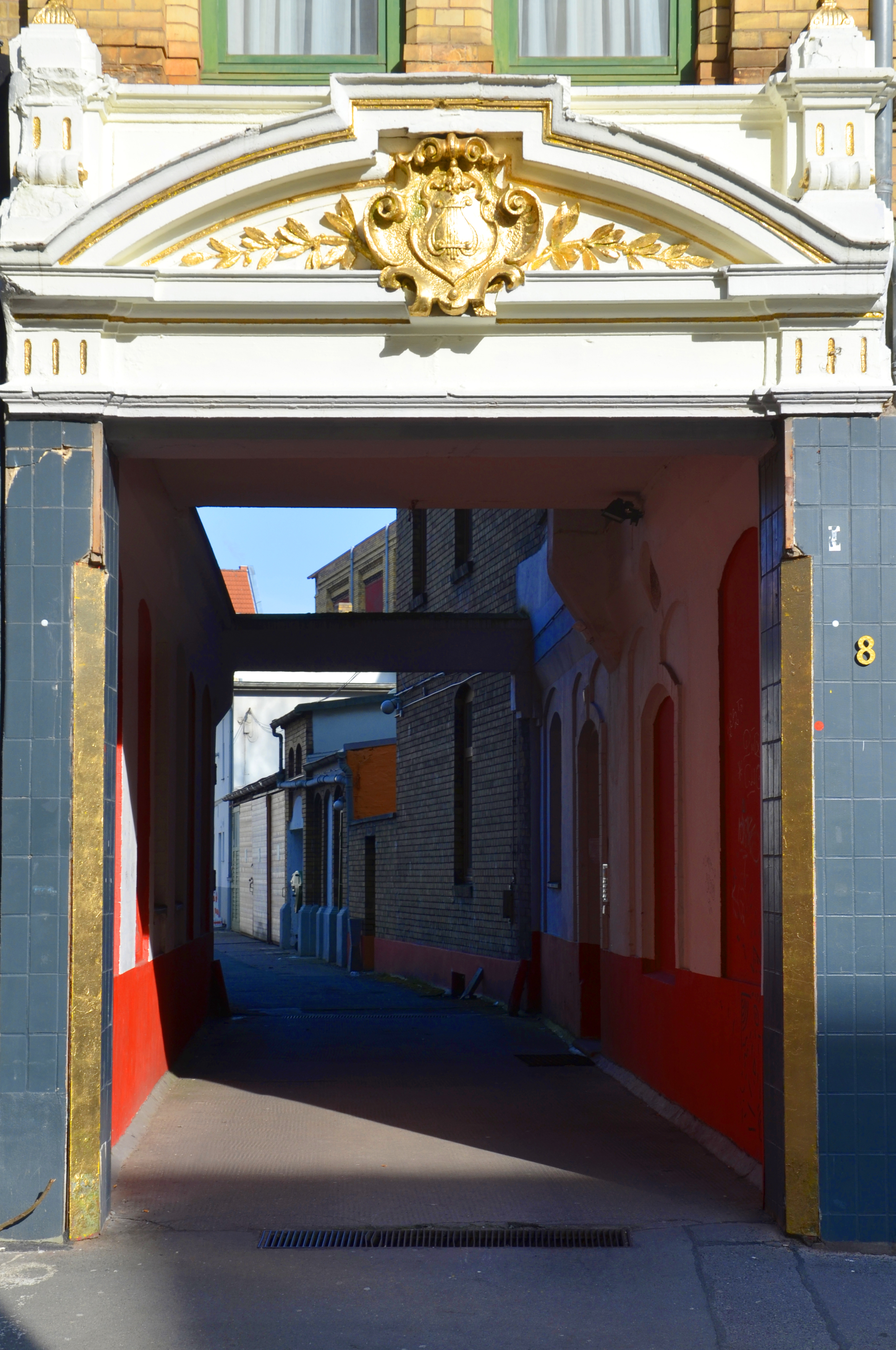 Von der Künstlerin Sonay Hardt, die den Secondhand- und Kunsthandwerkladen in der Oberstraße 8 in der Nordstadt von Hannover betreibt, nachträglich vergoldete Lyra über der Durchfahrt zum Hinterhof des Gebäudes ...